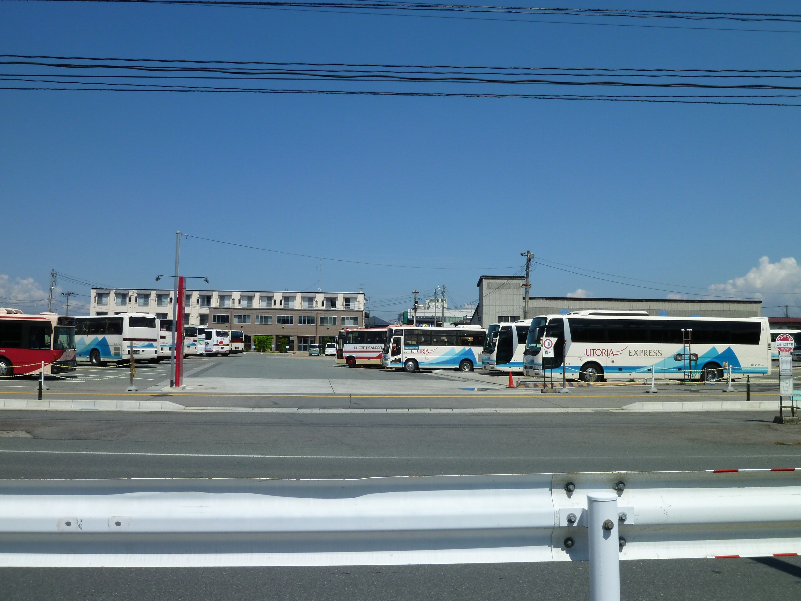 山交バス本社・山形営業所 （山形市清住町）